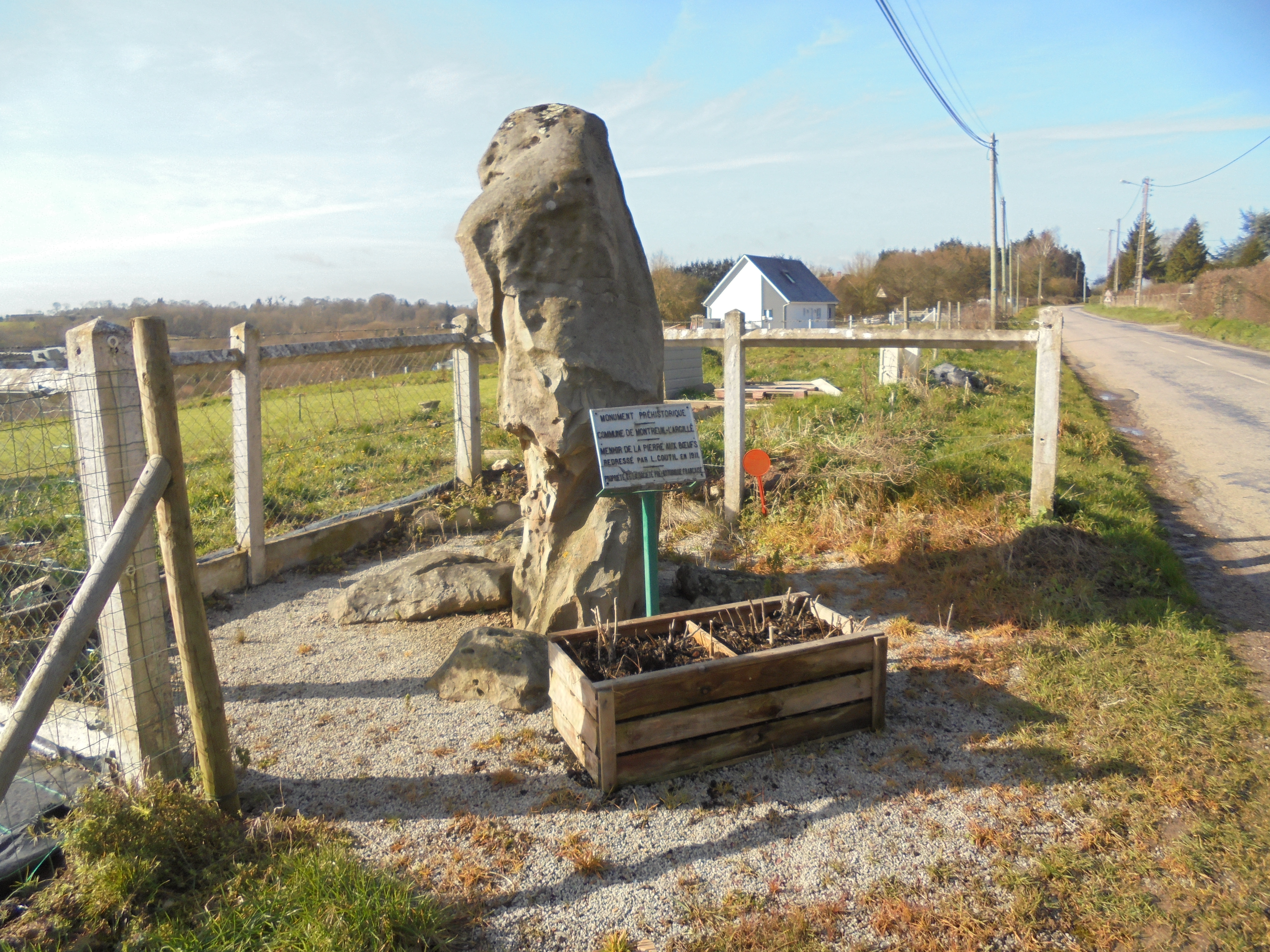 Menhir de la pierre aux boeufs à Montreuil l'Argillé dans l'Eure